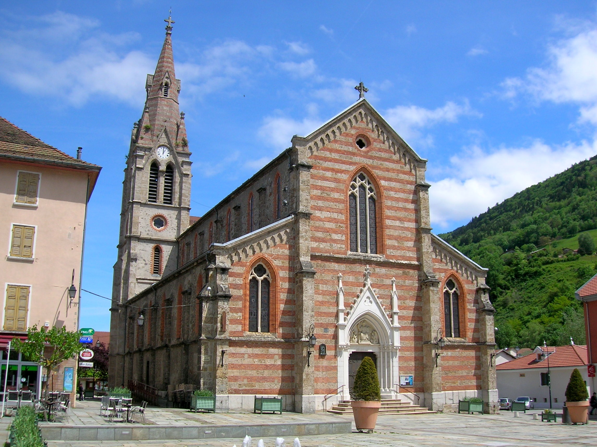 église de Allevard, Isère, France.